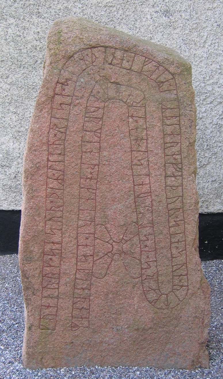 a runestone